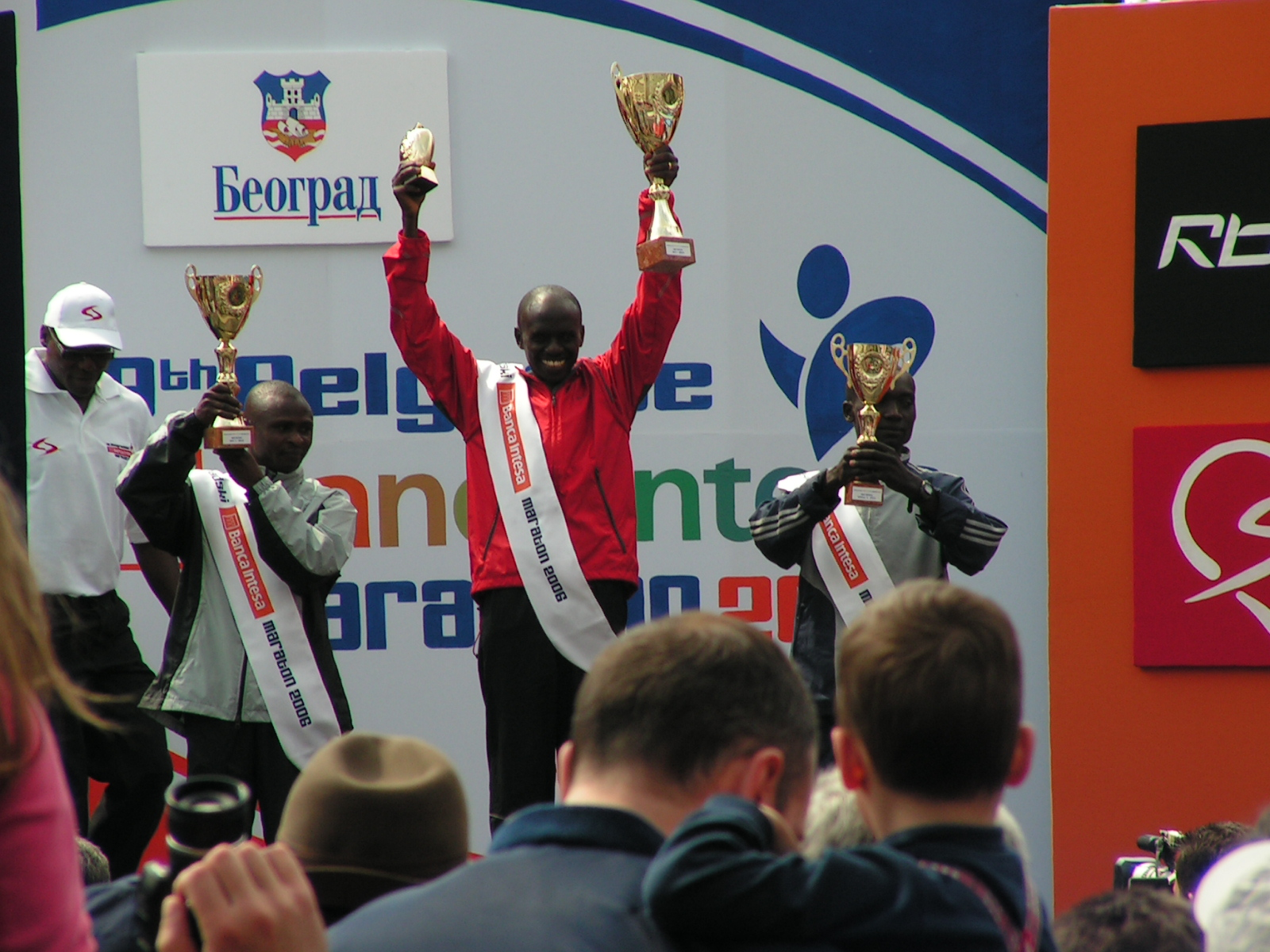 Beogradski maraton